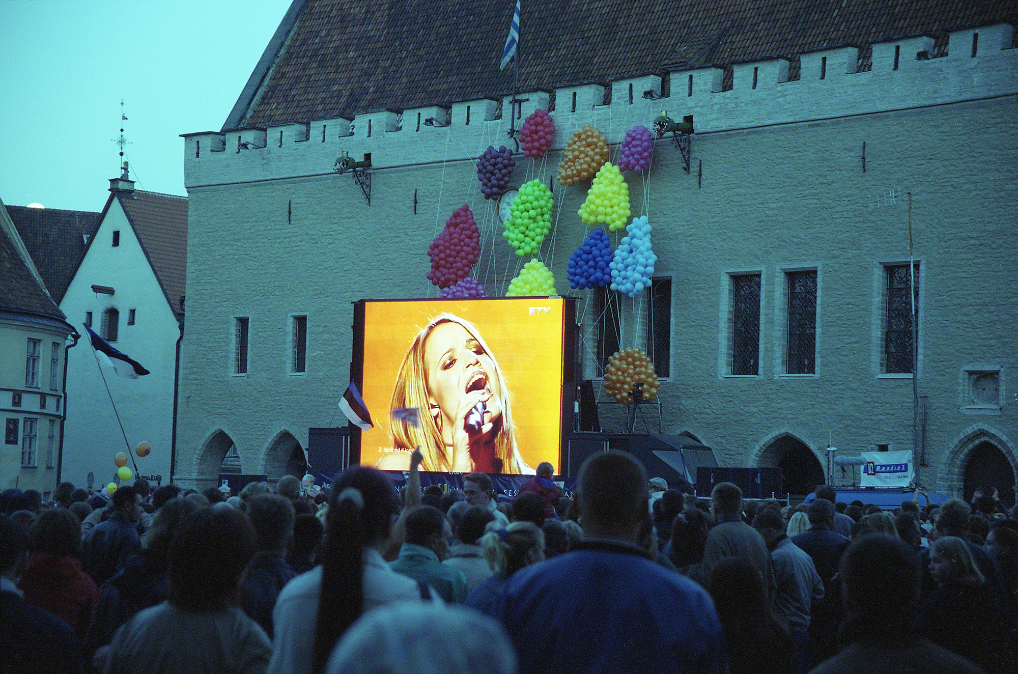 Eurovisiooni 2002 Raekoja platsil (13)